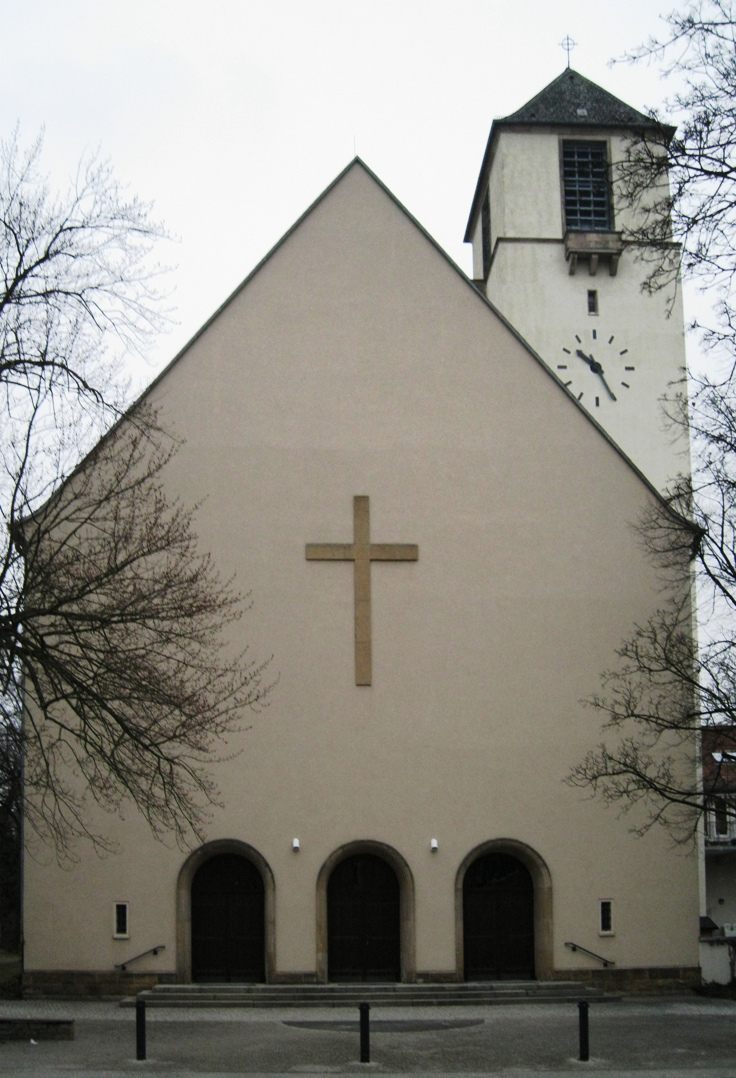 Hauptgiebel der Lindenkirche mit drei Rundportalen und darüber befindlichen Kreuz